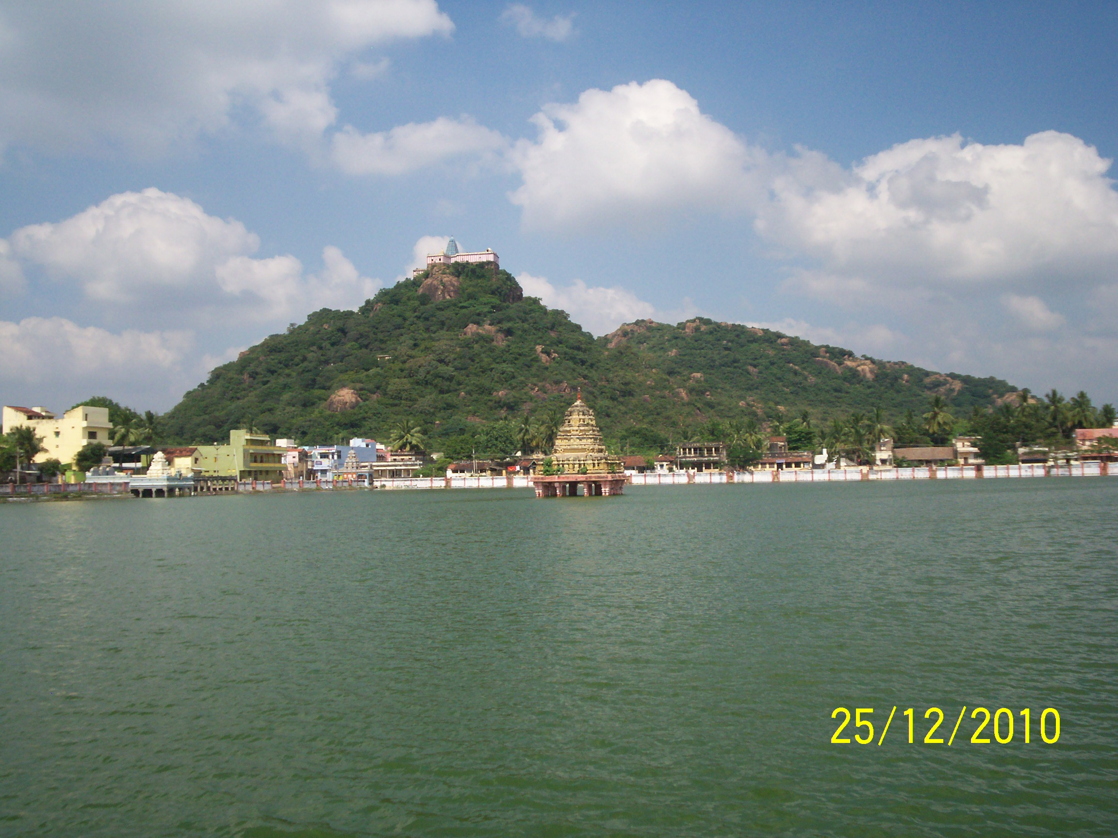 திருக்கழுக்குன்றம் சங்குதீர்த்த குளம்